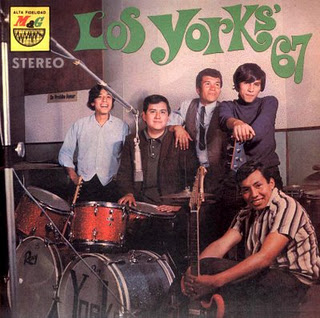 Los Yorks en 1967